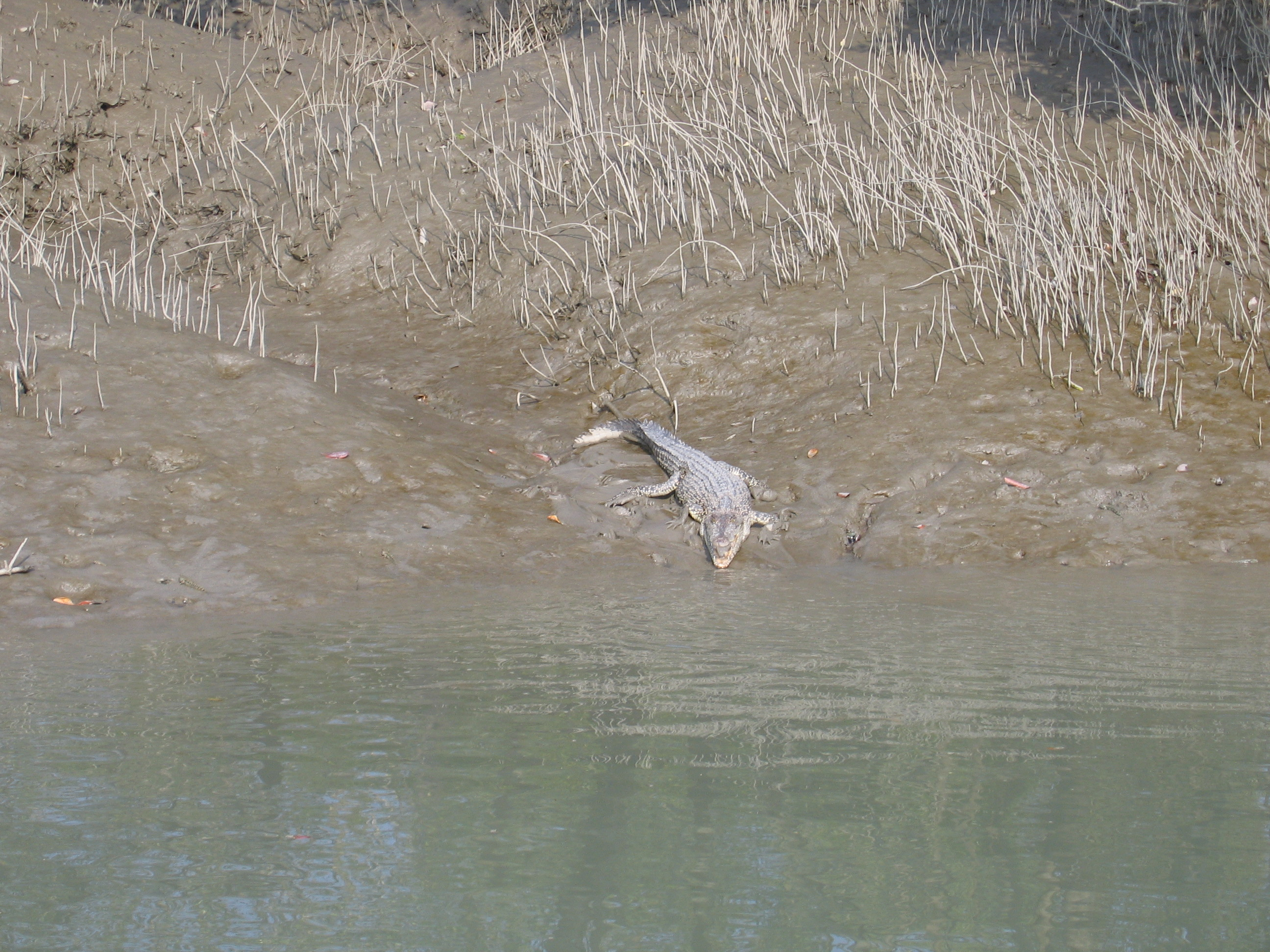 Sunderbans National Park